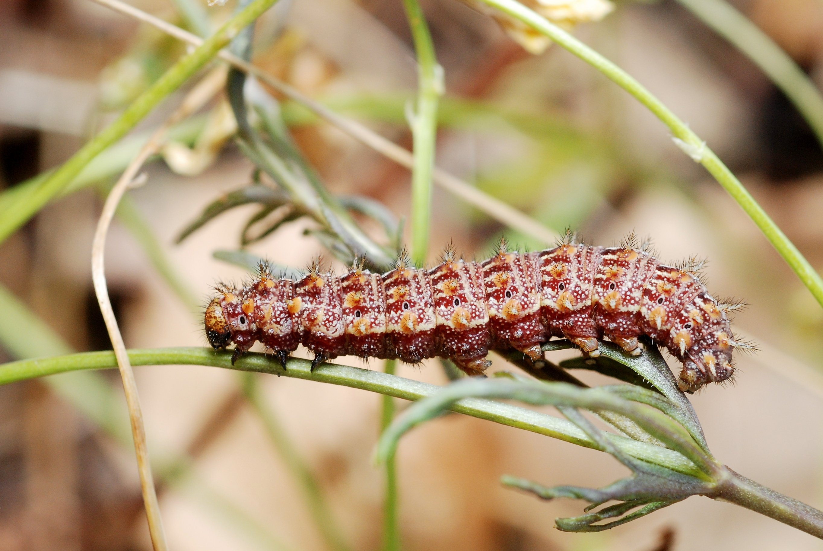 On its host plant : Viola calaminaria